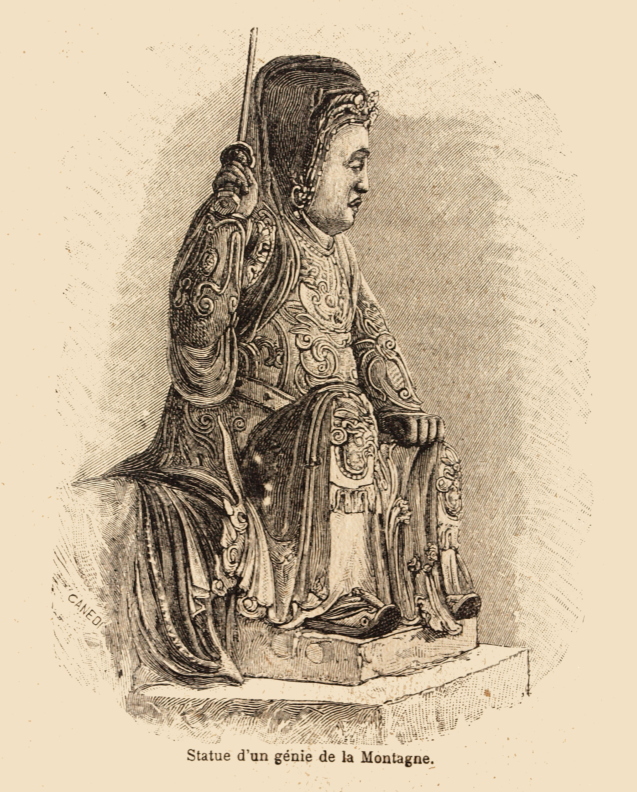 Gravure insérée dans l'ouvrage du missionnaire catholique romain Léon-Xavier Girod (mort en 1924), Dix Ans de Haut-Tonkin, édité chez Alfred Mame & fils à Tours, en 1899